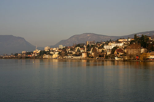 Neuchâtel